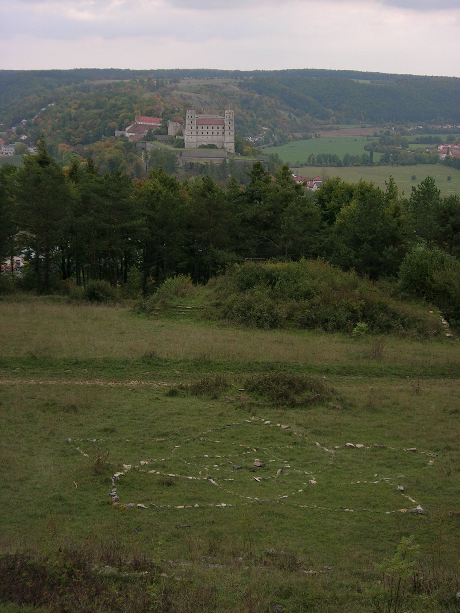 Hohes Kreuz Eichstätt: Blick auf Thingstätte und Willibaldsburg.